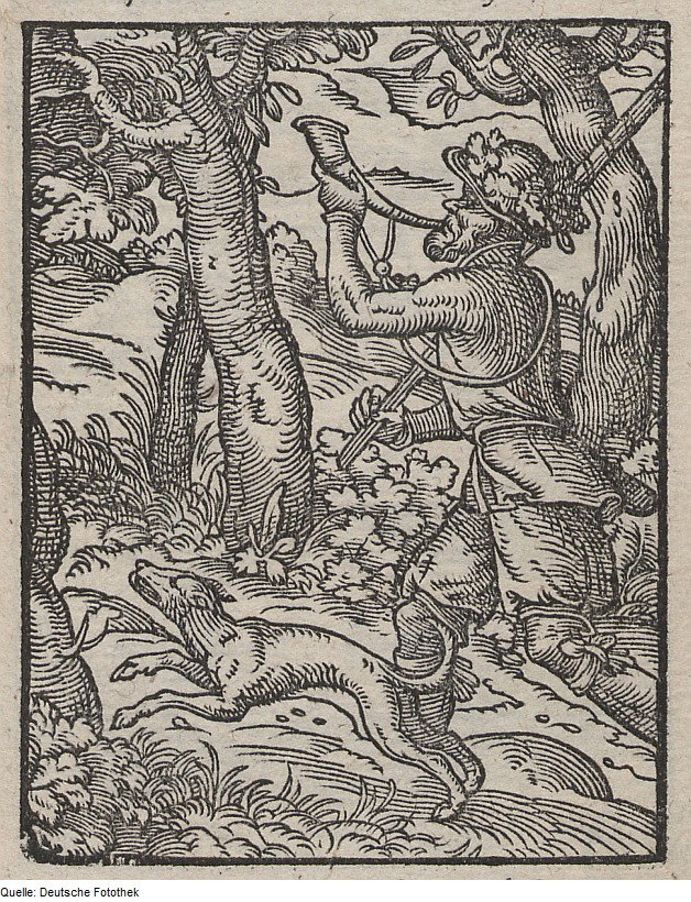 Original image description from the Deutsche Fotothek Ständebuch & Jäger & Förster